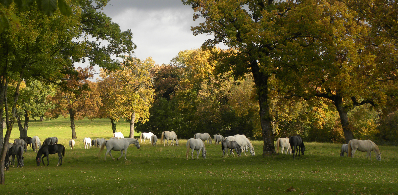 Lipica horses